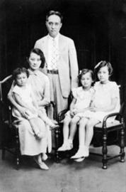 从右至左依次為：梅仪慈、梅仪芝、梅光迪、李今英、梅仪昭